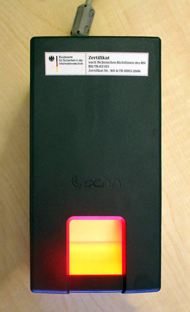 Fingerabdruck-Scanner, wie er für den Reisepass in Deutschland ab dem 1. November 2007 zum Einsatz kommt. Hersteller: Cross Match Technologies GmbH, Jena Modell: L SCAN 100 Patente US: 7.130.456 DE: 1.015.3.351